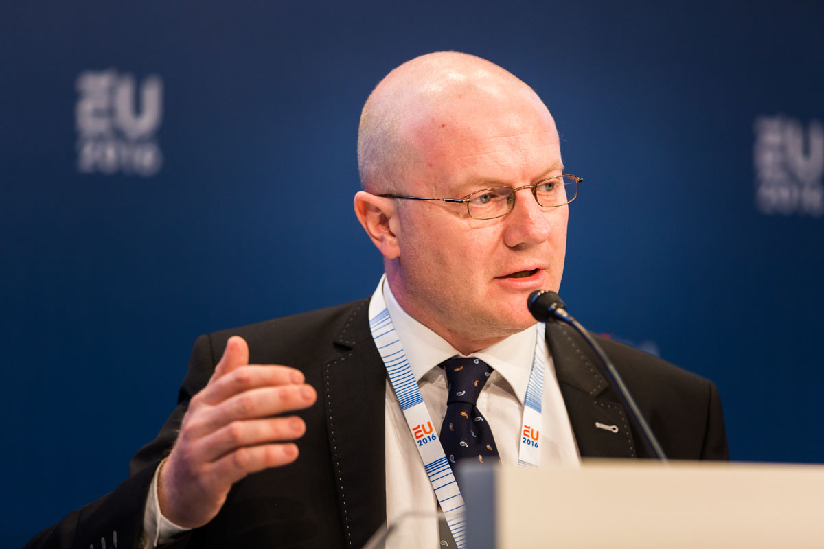 EU 2016,Amsterdam, 8 februari 2016. Conferentie van ministerie van Sociale Zaken en Werkgelegenheid SZW, "Promoting Decent Work" Op de foto : Maciej Duszczyk